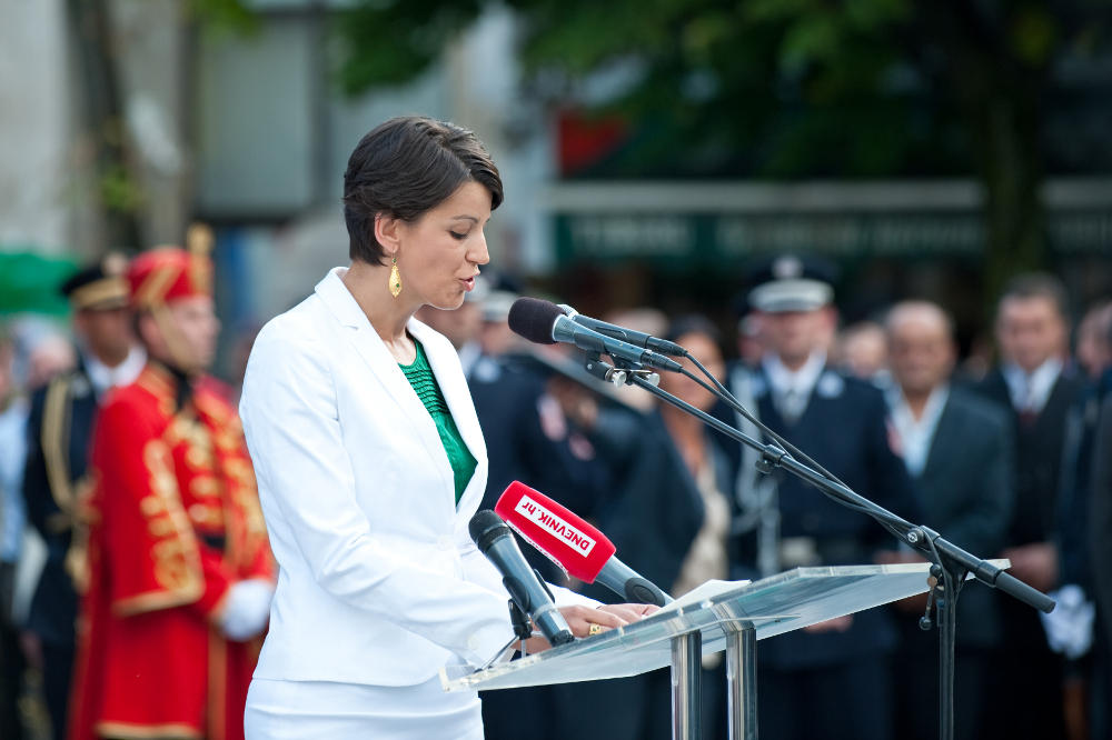 16. obljetnica vojnoredarstvene operacije Oluja